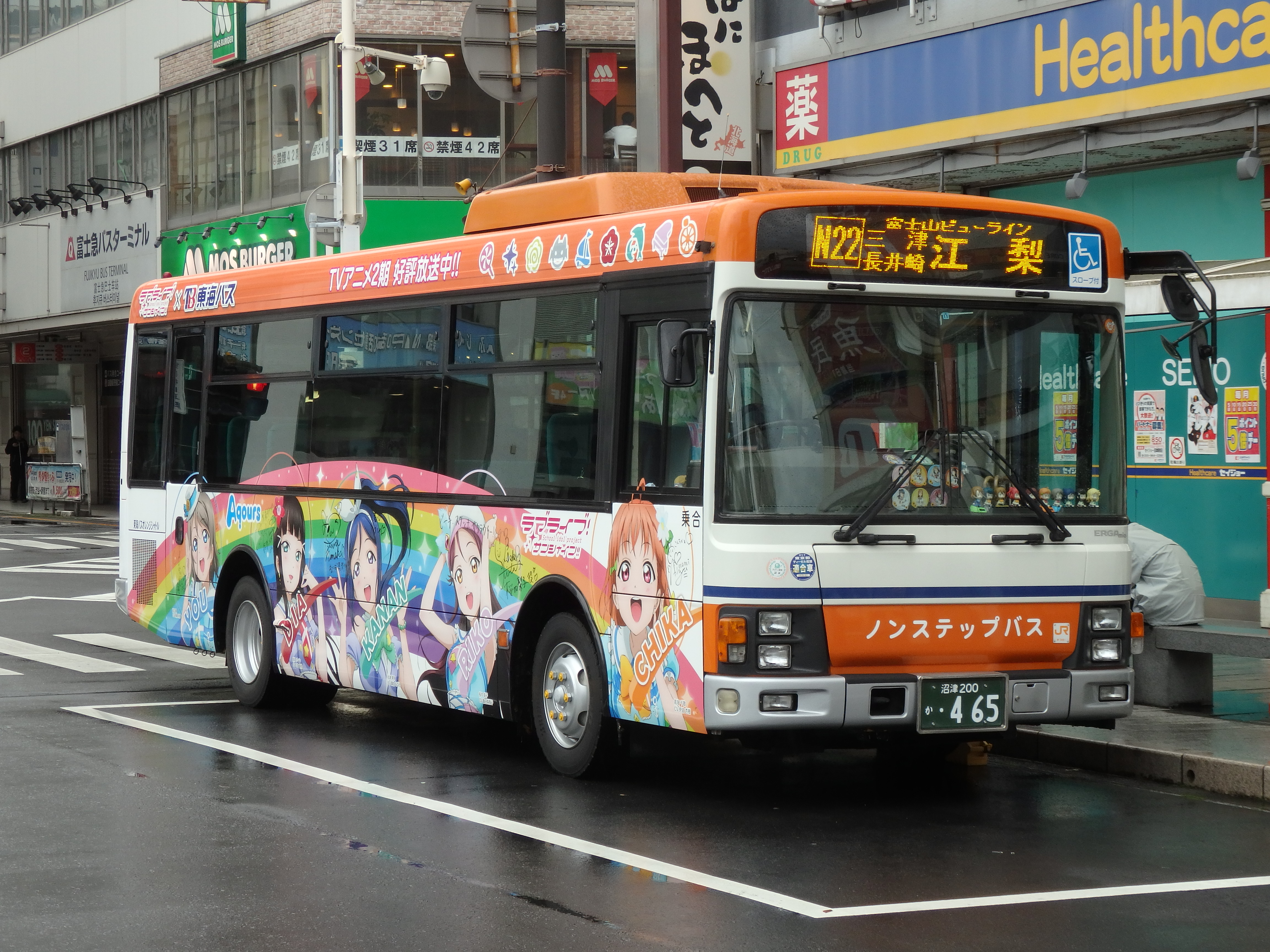 東海バスオレンジシャトル沼津200か465